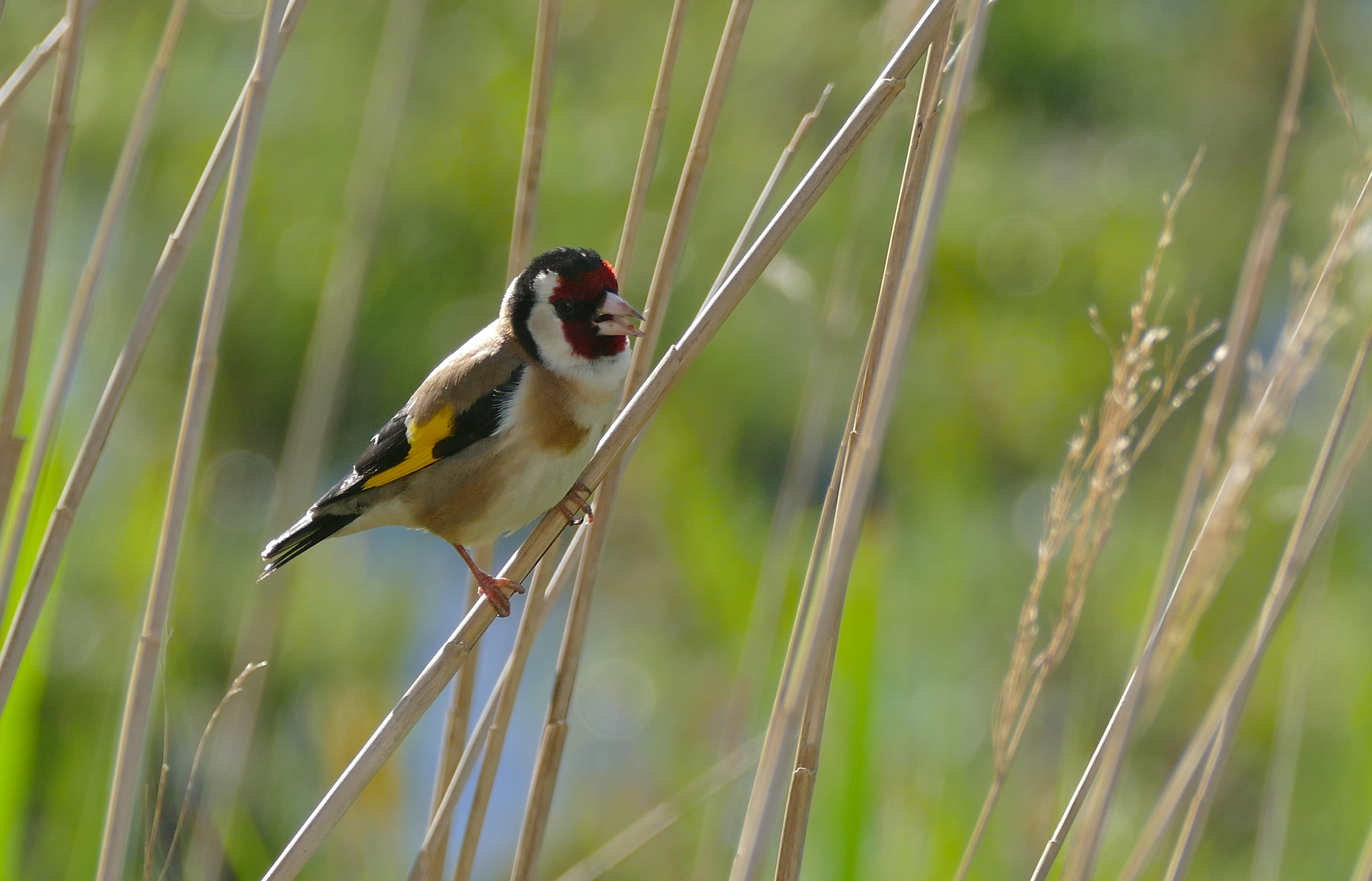 Aguait del Matar, Estanys del Matar, Los Aiguamolls del' Empordà, Castelló d'Empúries, Catalunya, SPAIN